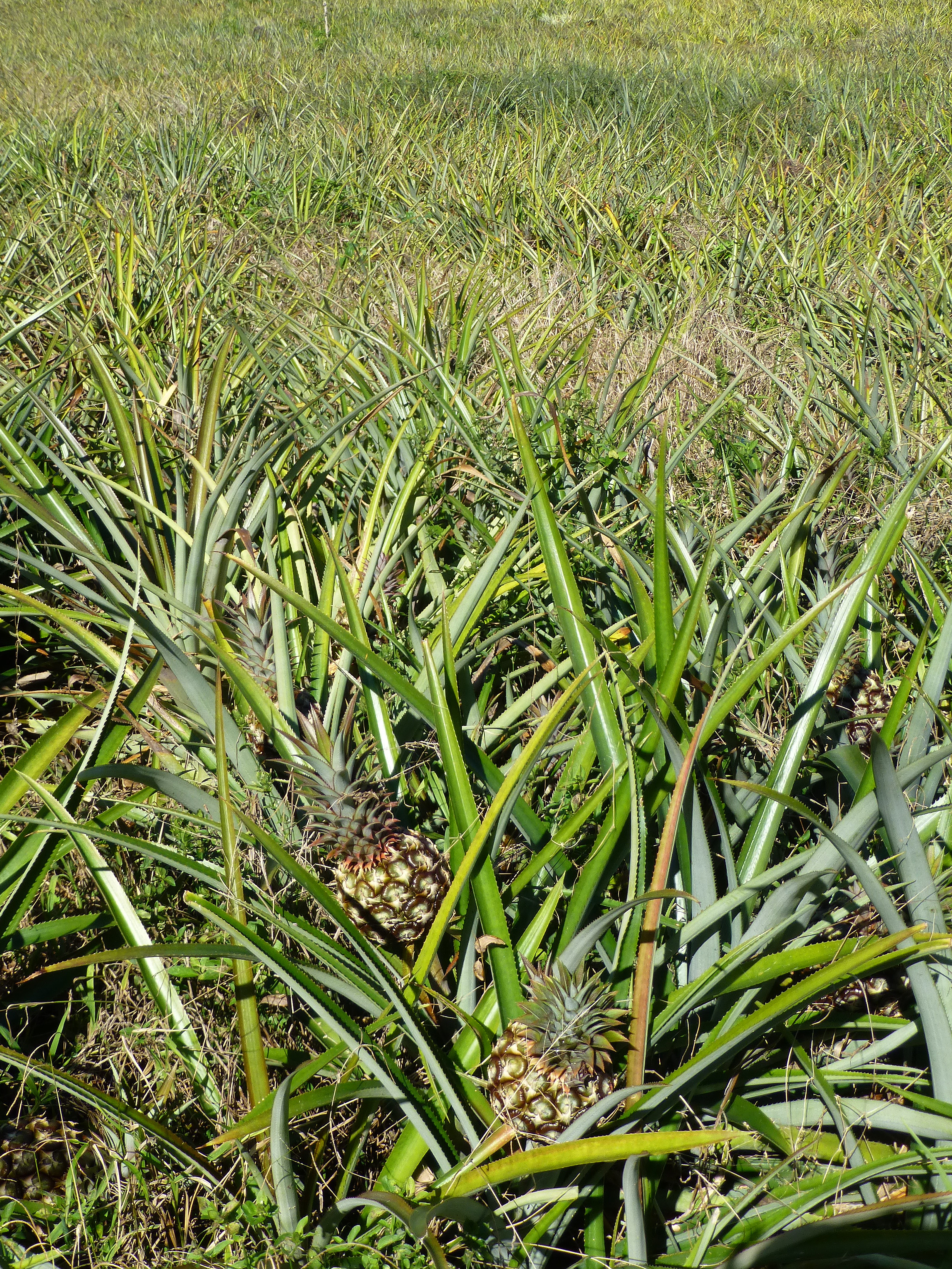 Plantation d'ananas dans la vallée de Viñales (Cuba)